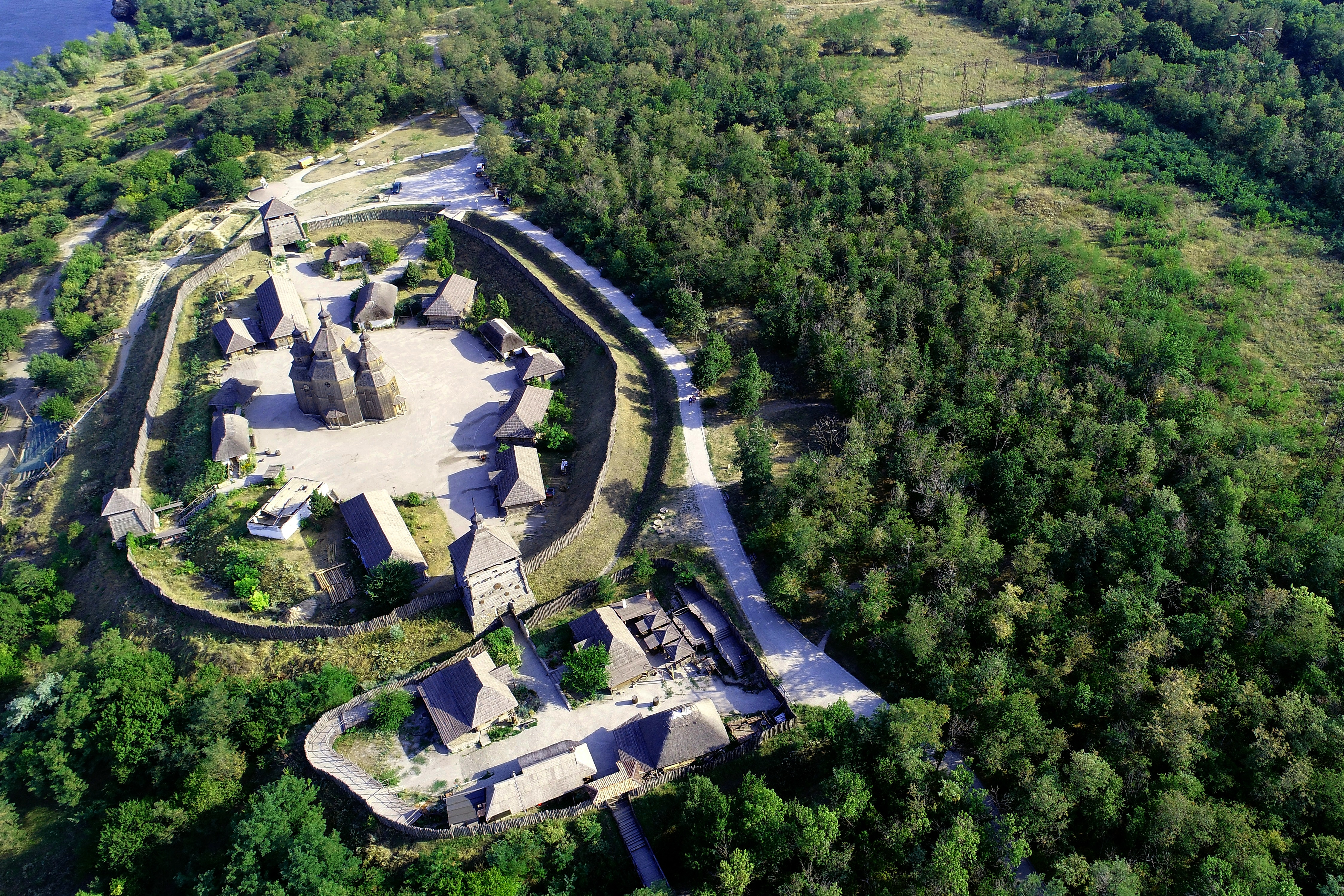 Національний заповідник «Хортиця», Запоріжжя, о. Хортиця